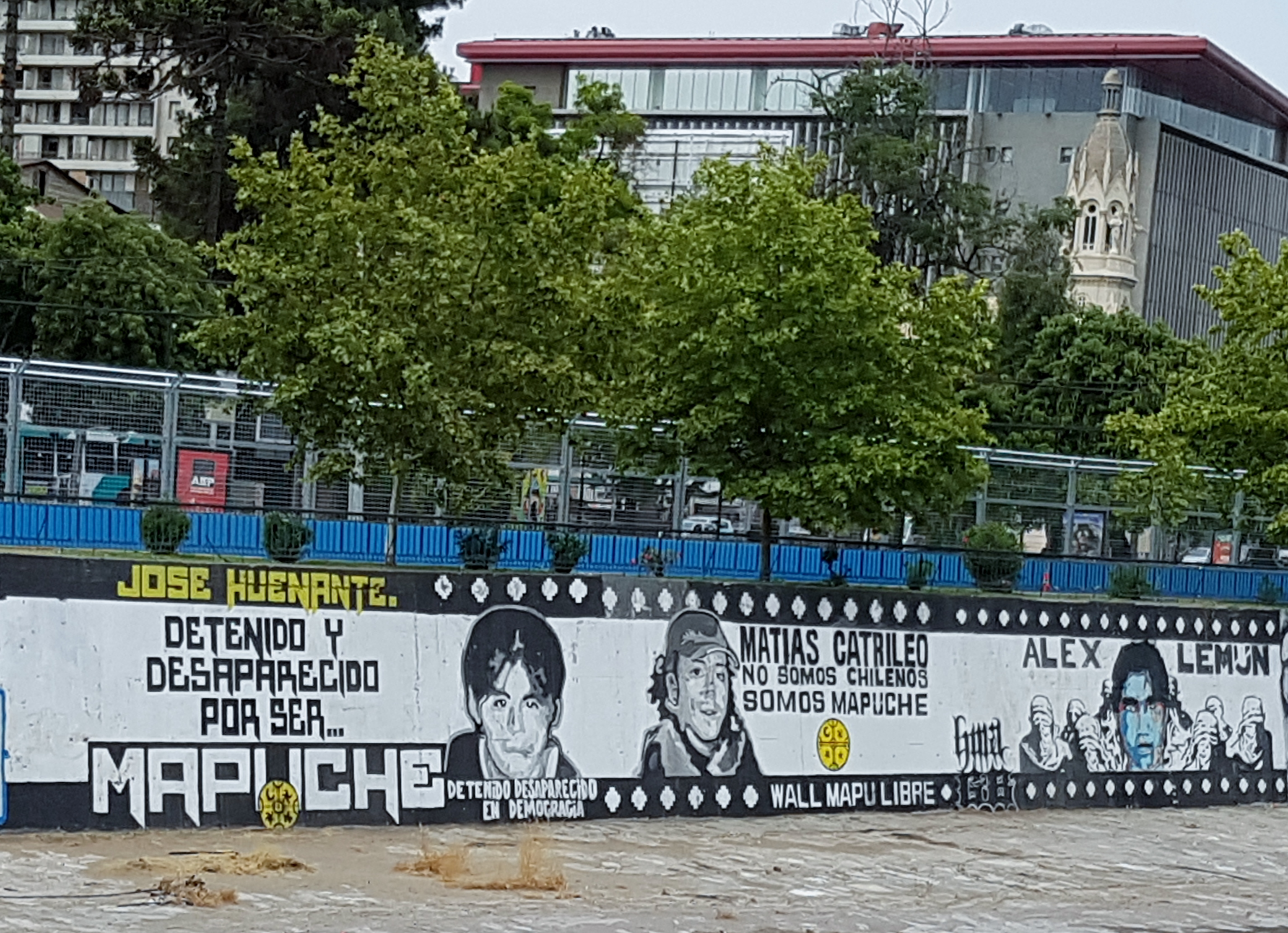 Grafiti relativo a los casos de José Huenante, Matías Catrileo y Alex Lemún. Ribera norte del río Mapocho, casi al llegar al puente Pío Nono, Santiago de Chile.